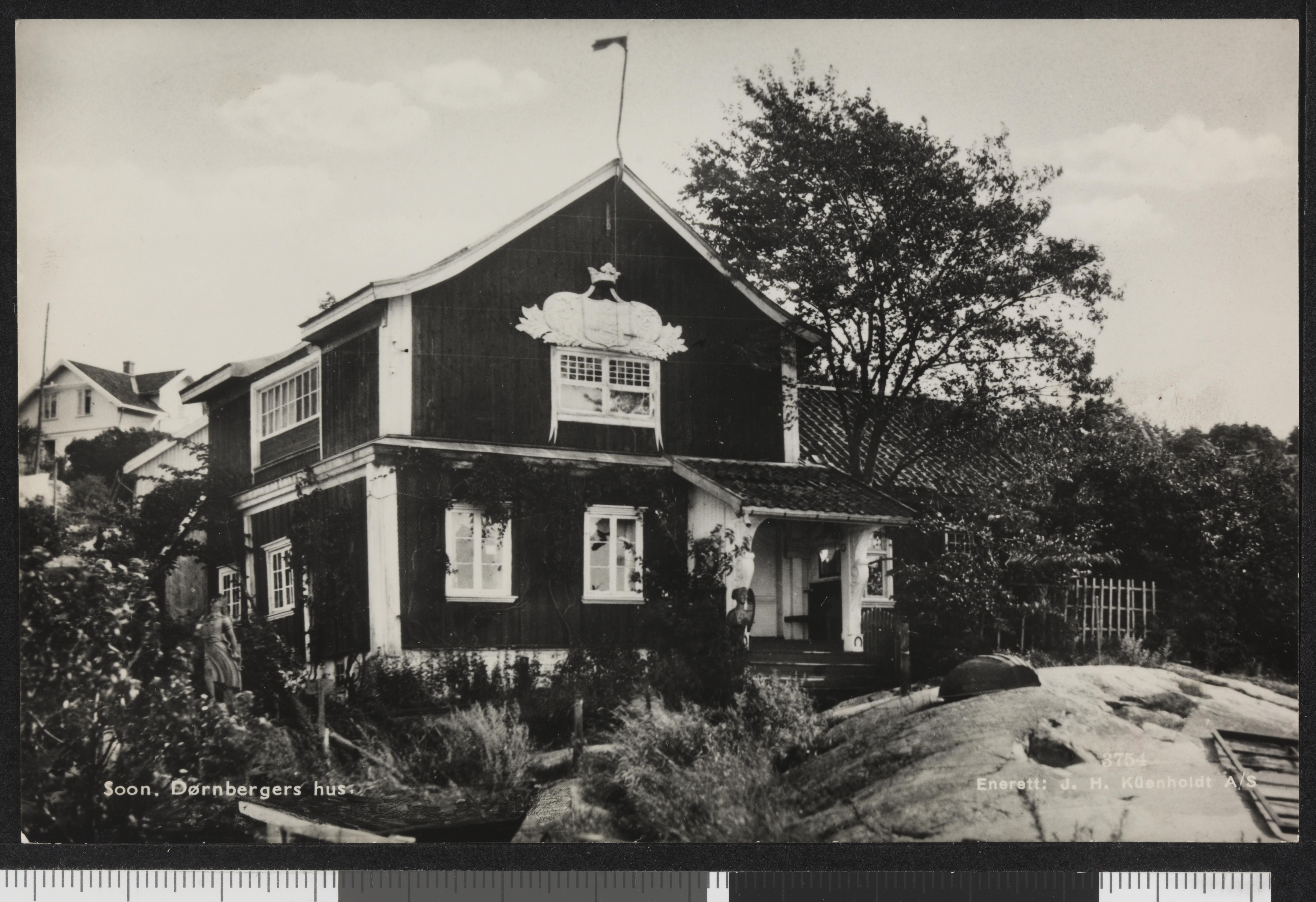 Bildet er hentet fra Nasjonalbibliotekets bildesamling Son, Vestby, Akershus